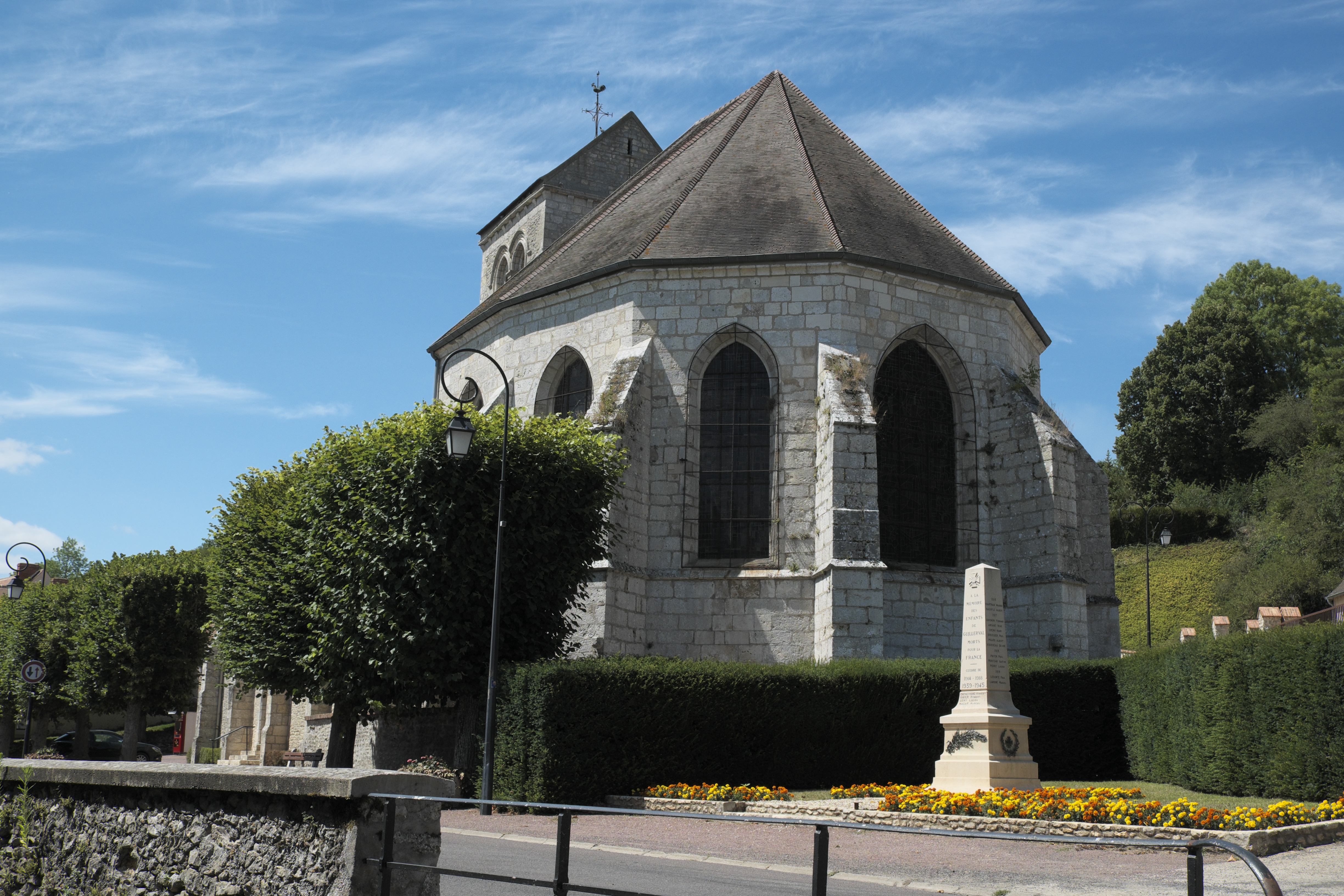 Katholische Kirche Saint-Gervais-Saint-Protais in Guillerval im Département Essonne (Île-de-France/Frankreich), Chor